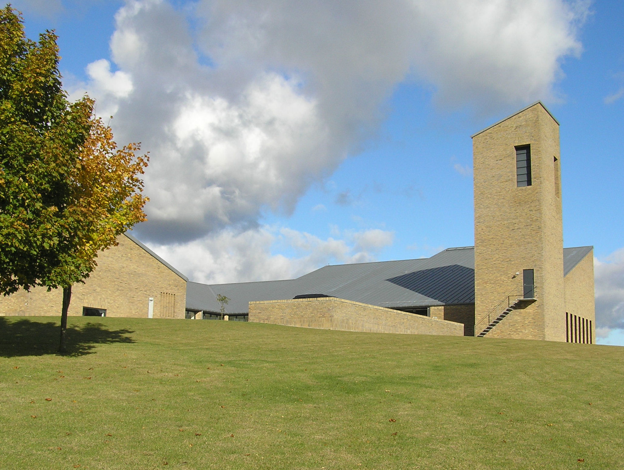 Antvorskov Kirke med Sognegård. Antvorskov Kirke er indviet 2005-04-11 af biskop Jan Lindhardt. Arkitekt på byggeriet var Anders Bové Christensen, Aarhus.